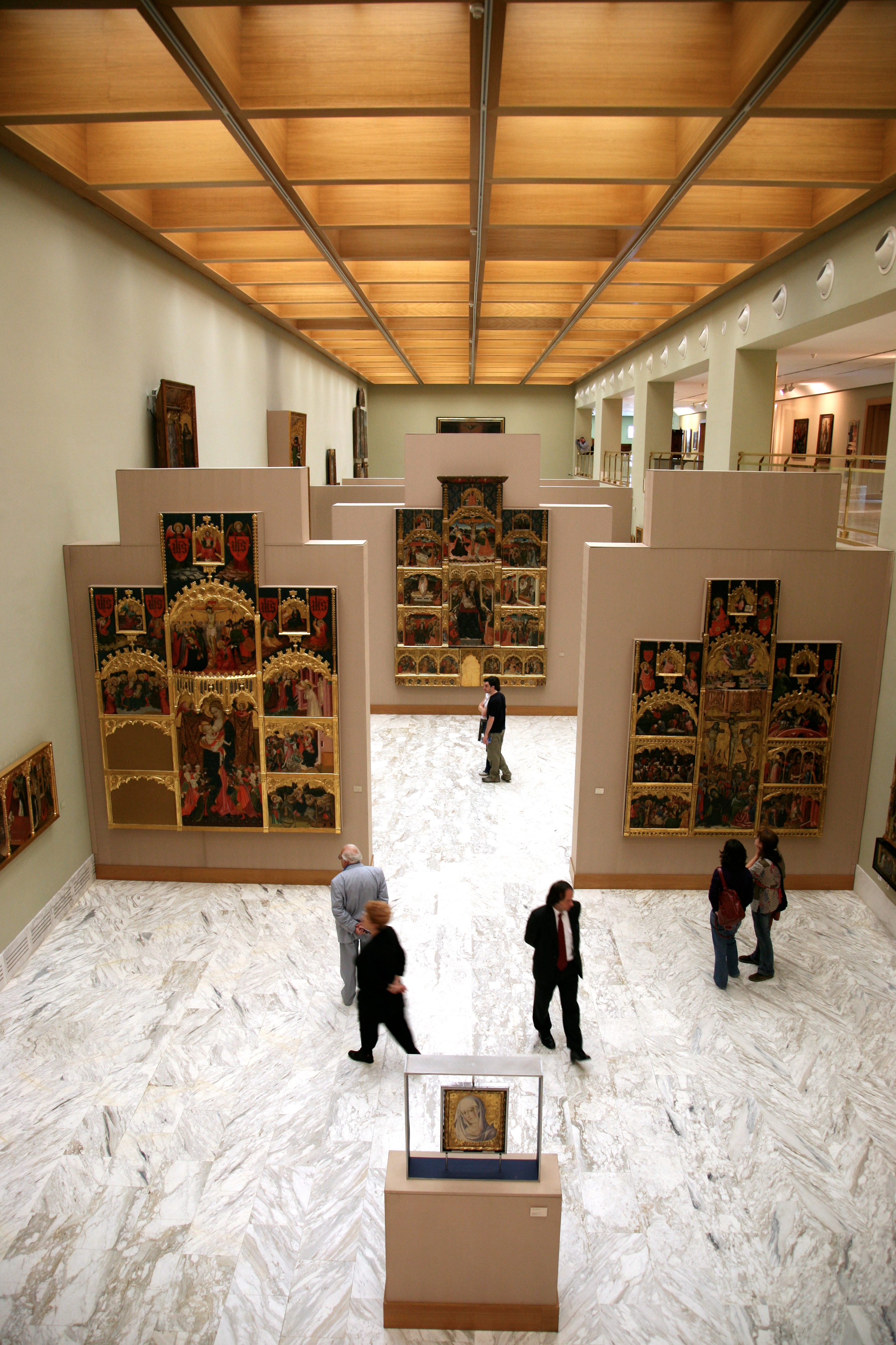 primer plano izquierda - Retablo de la Virgen de la Leche, 286 x 277 cm ANTONI PERIS (documentado en Valencia entre 1404 y 1423) primer plano derecha Retablo de la Santa Cruz, 259 x 260 cm MIQUEL ALCANYÍS (documentado entre 1407 y 1447. Activo en Valencia, Barcelona y Mallorca) Museo